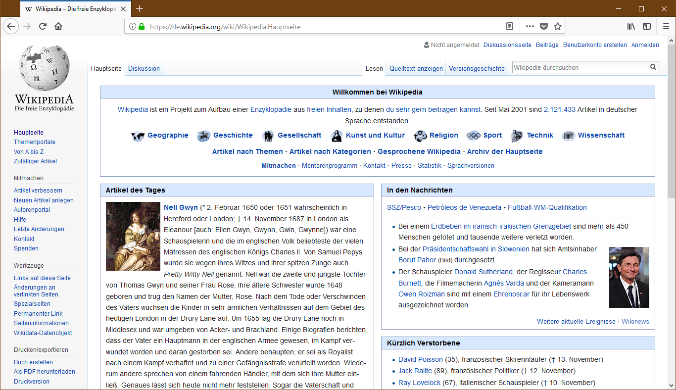 Mozilla Firefox 57.0 (Codename: Quantum) unter Windows 10